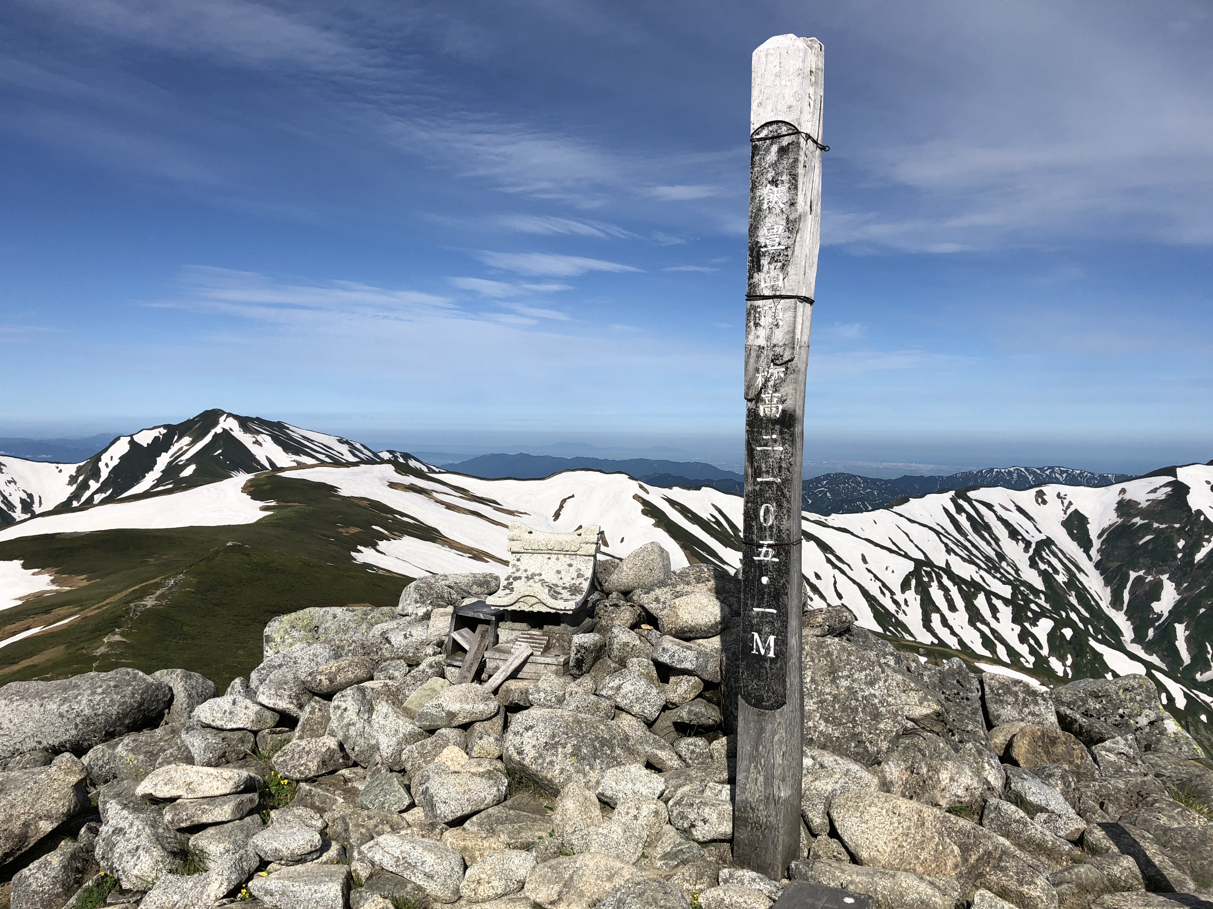 山頂